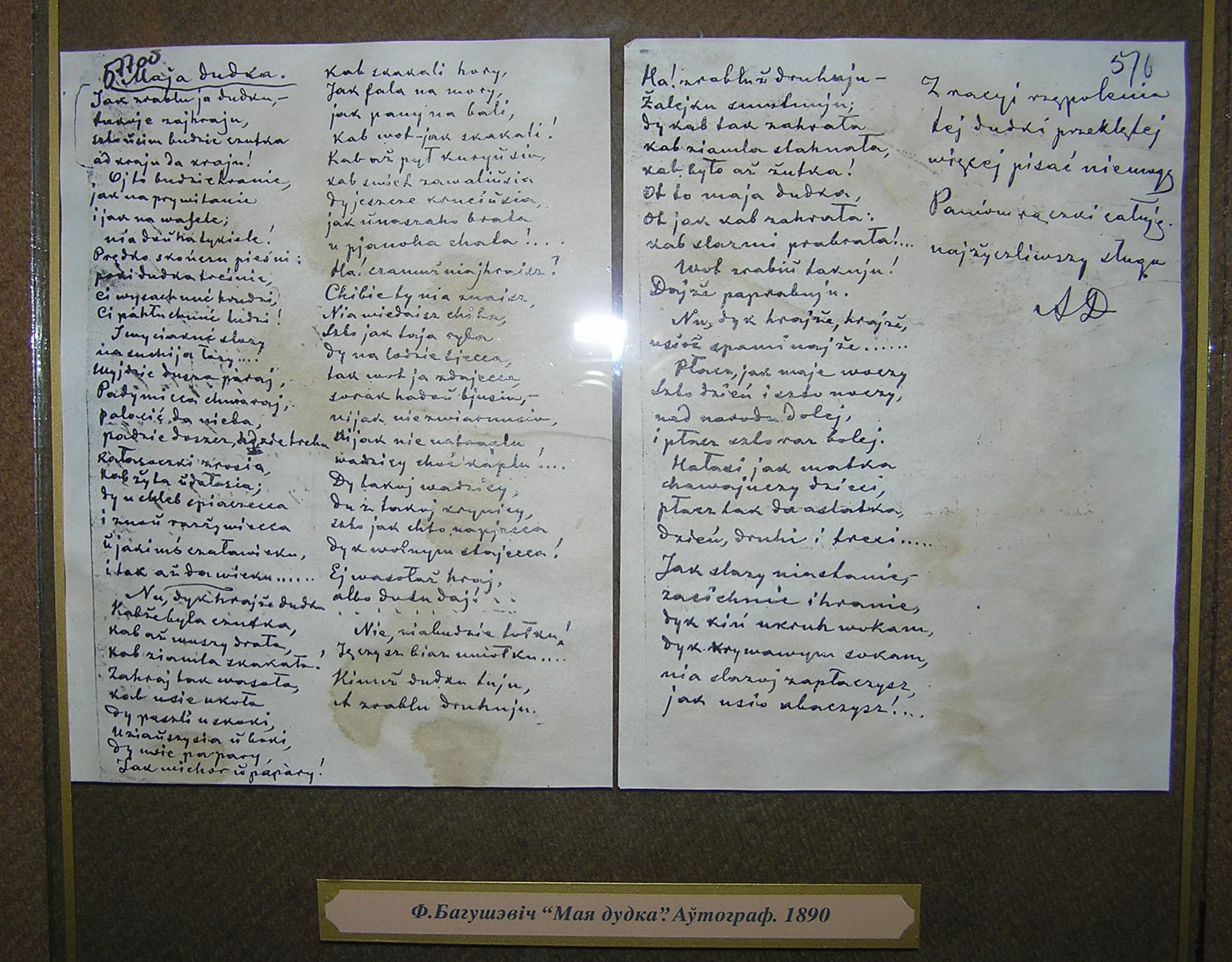 Беларуская (тарашкевіца): Ф. Багушэвіч, МАЯ ДУДКА